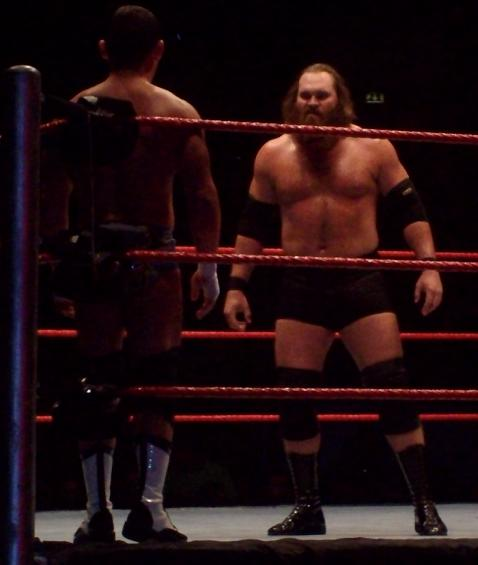 Jamie Noble Vs. Mike Knox - Survivor Series Tour 2008 - 7 novembre 2008